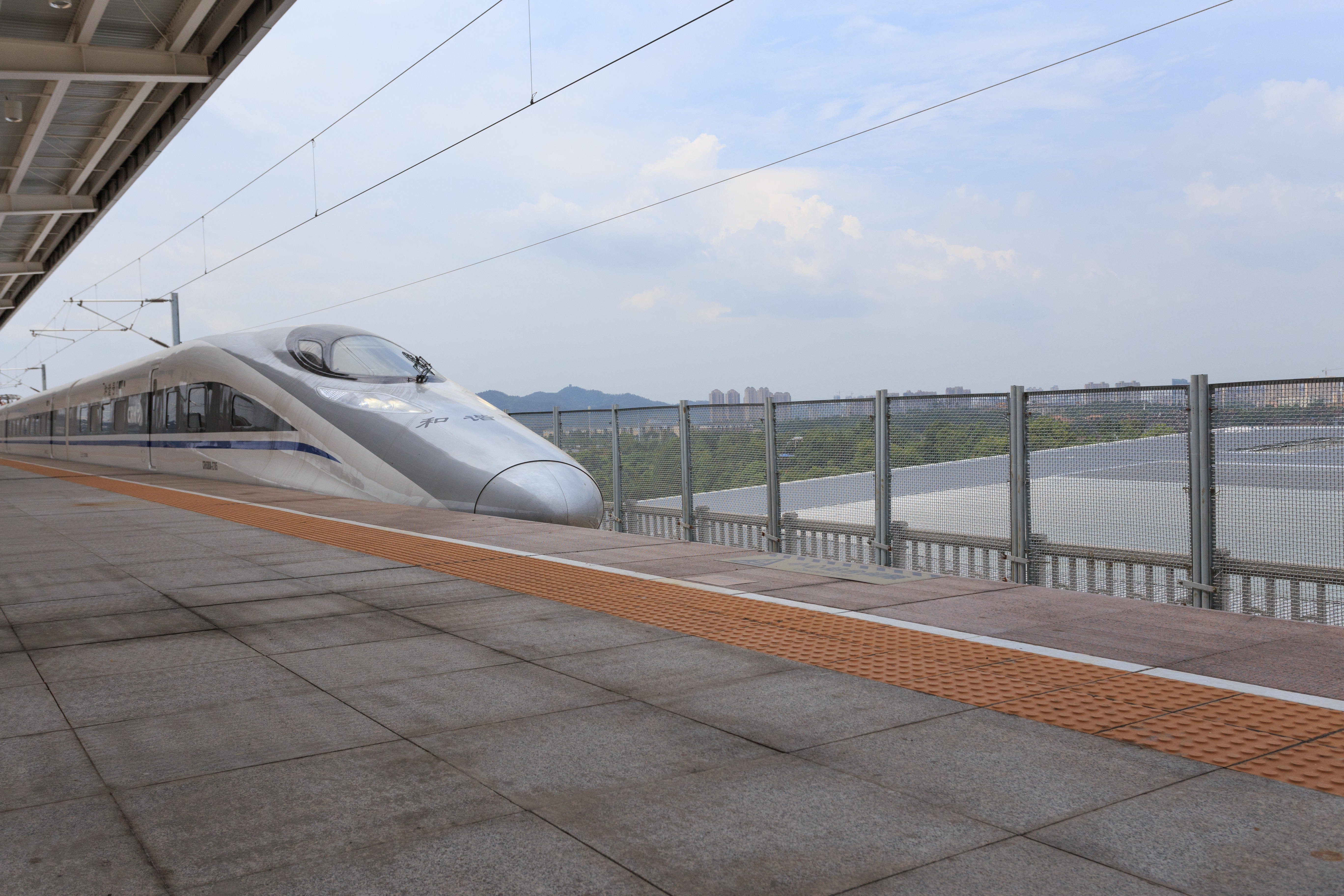 2015年6月28日合福客运专线开通，首趟北上的列车G2626次在上午10点47分驶入上饶站